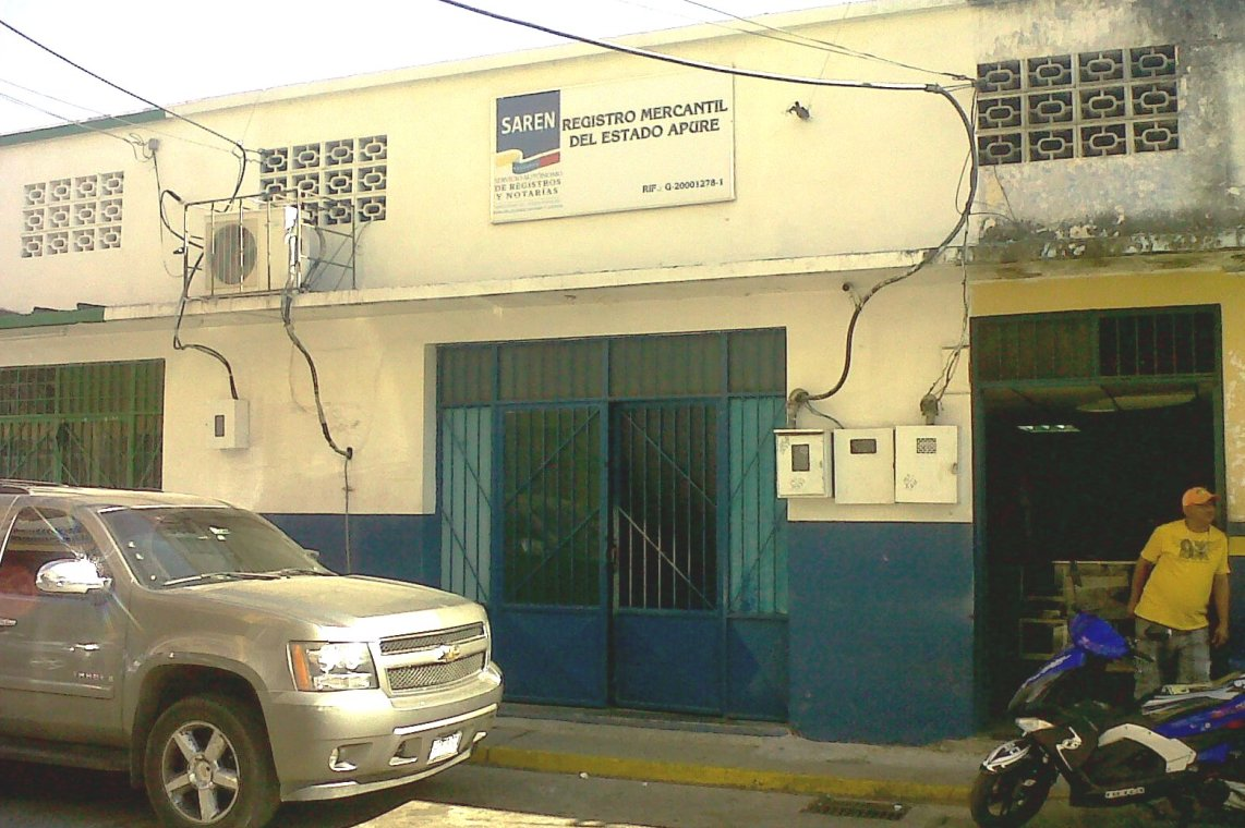 SAREN Registro Mercantil Apure Venezuela. San Fernando de Apure estado Apure, Venezuela, frente a la Clinica Jose Maria Vargas.